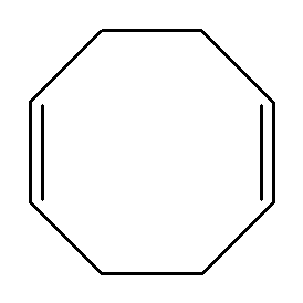 1,5-cyclooctadieen structuurformule